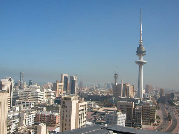 Kuwait City's skyline